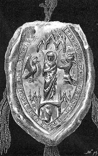 Szécsényi Mihály váci, majd egri püspök pecsétje (1893-as pecsétrajz az eredeti után)